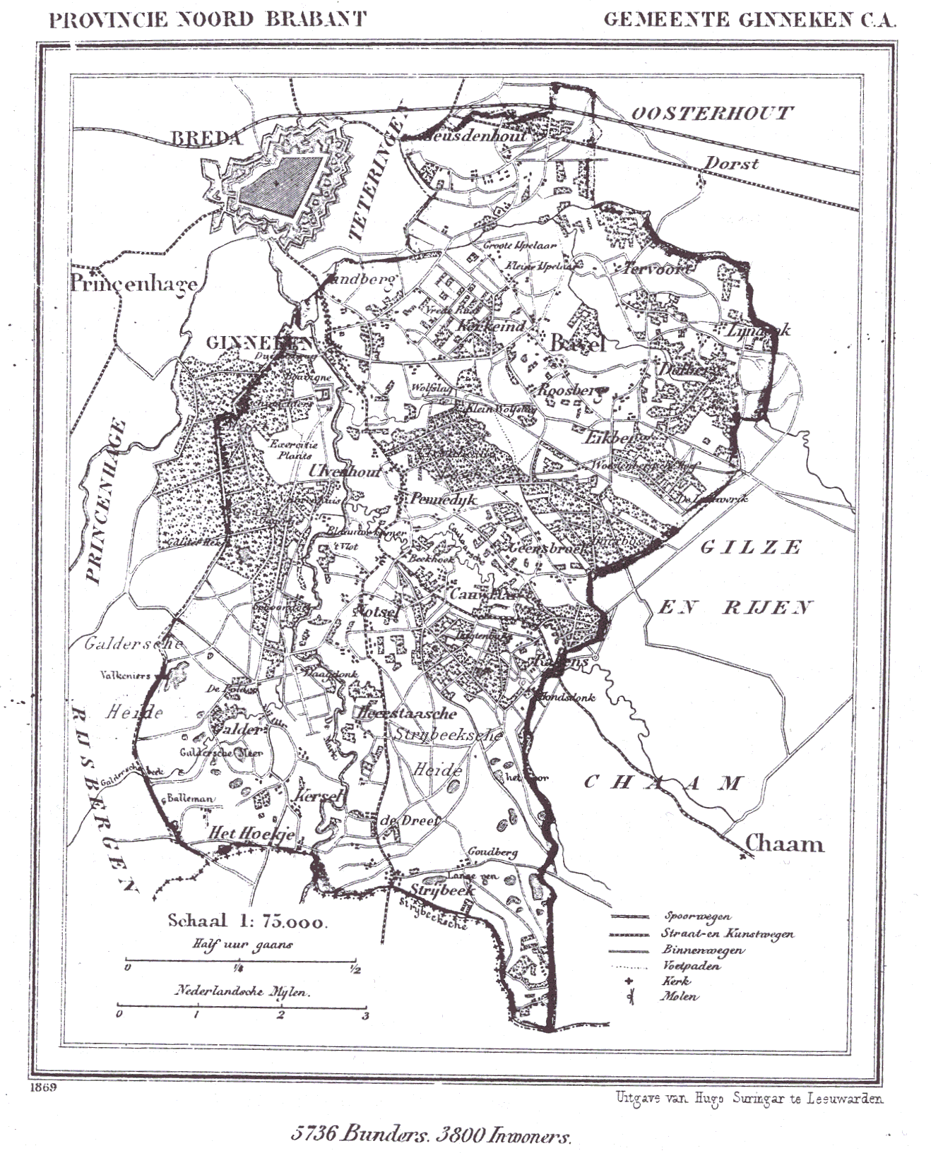 Nederland, Noord-Brabant, Gemeente Ginneken